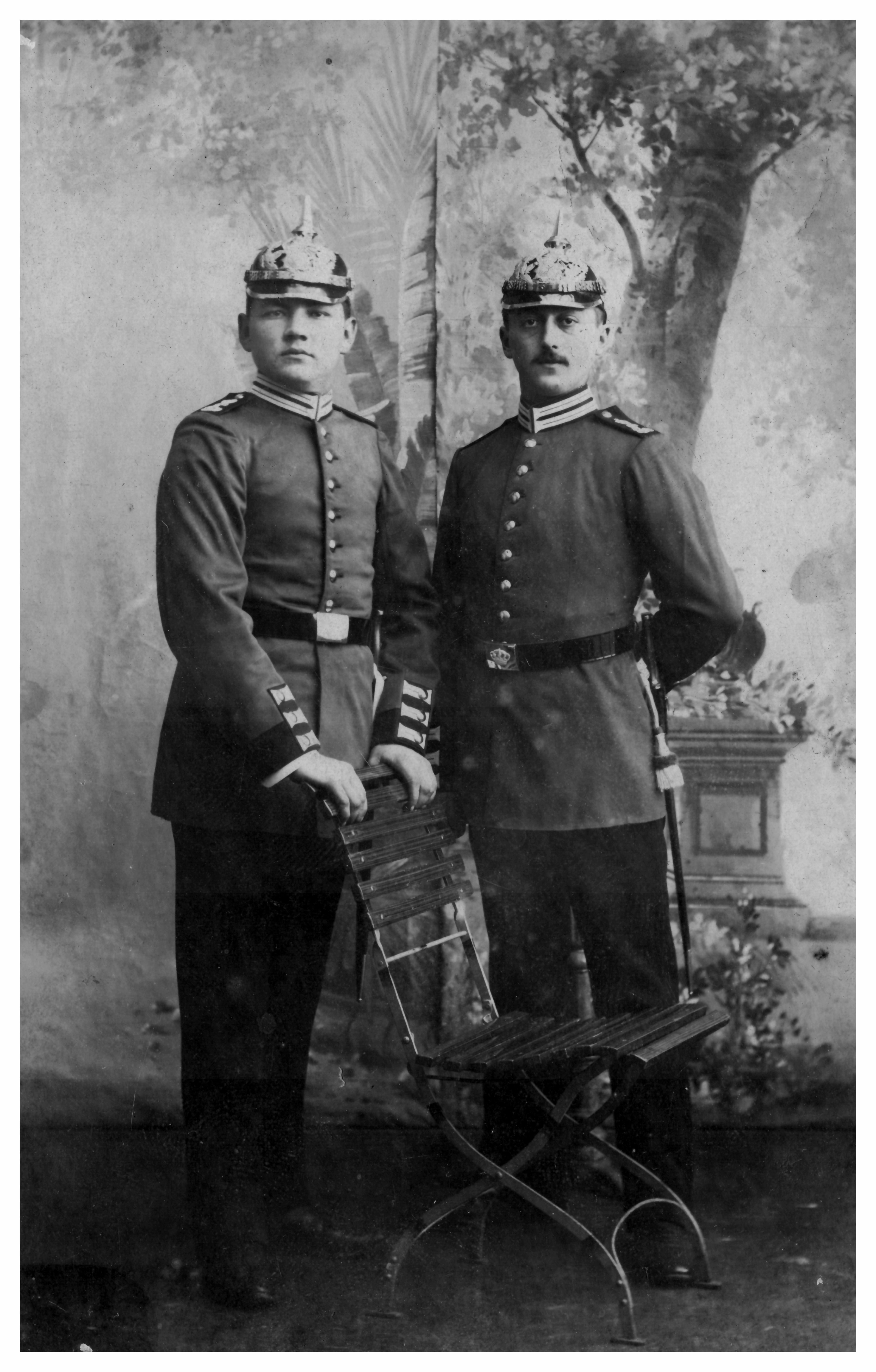 Studioaufnahme von 2 Soldaten des Leibgarde-Infanterie-Regiment (1. Großherzoglich Hessisches) Nr. 115. Gut zu sehen ist das hessische Koppelschloss mit 5-bügeliger Krone.